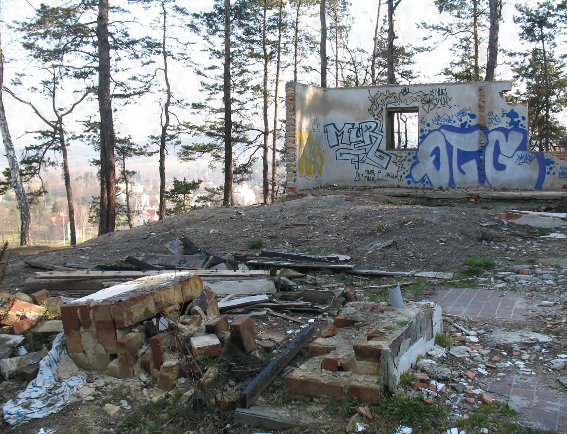 Zbytky původní stavby na místě, kde byla posléze vybudována nová chata a rozhledna